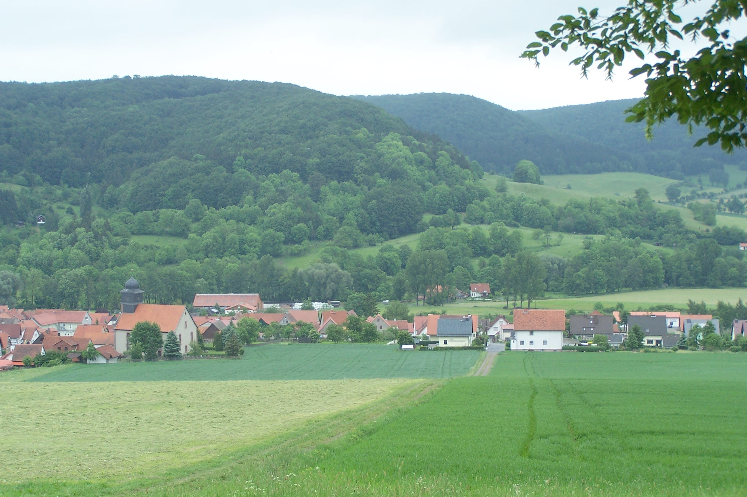 Ansichten aus dem Ort Diedorf im Feldatal.